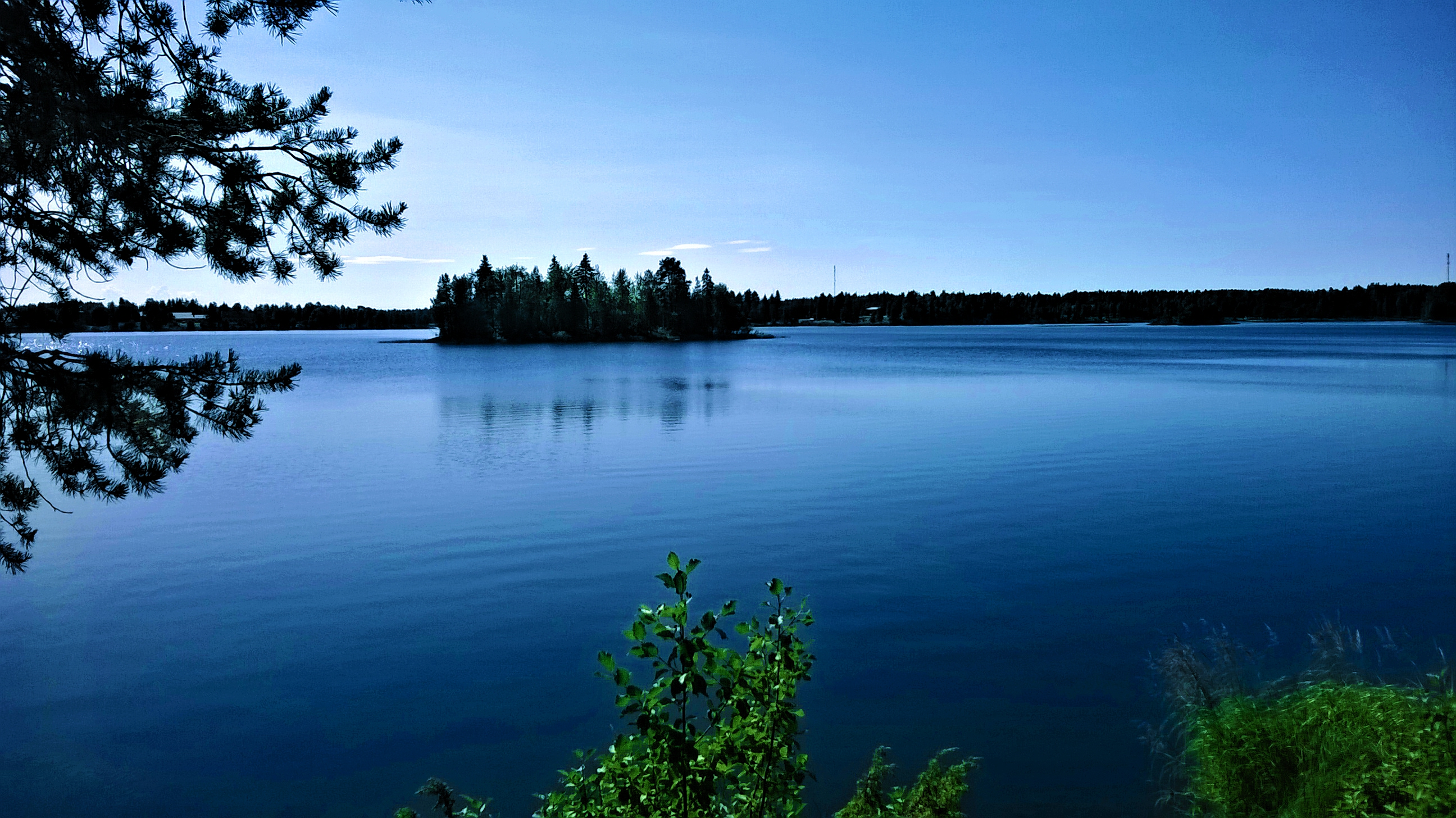 Ranuajärvi kansanopistolta kuvattu.